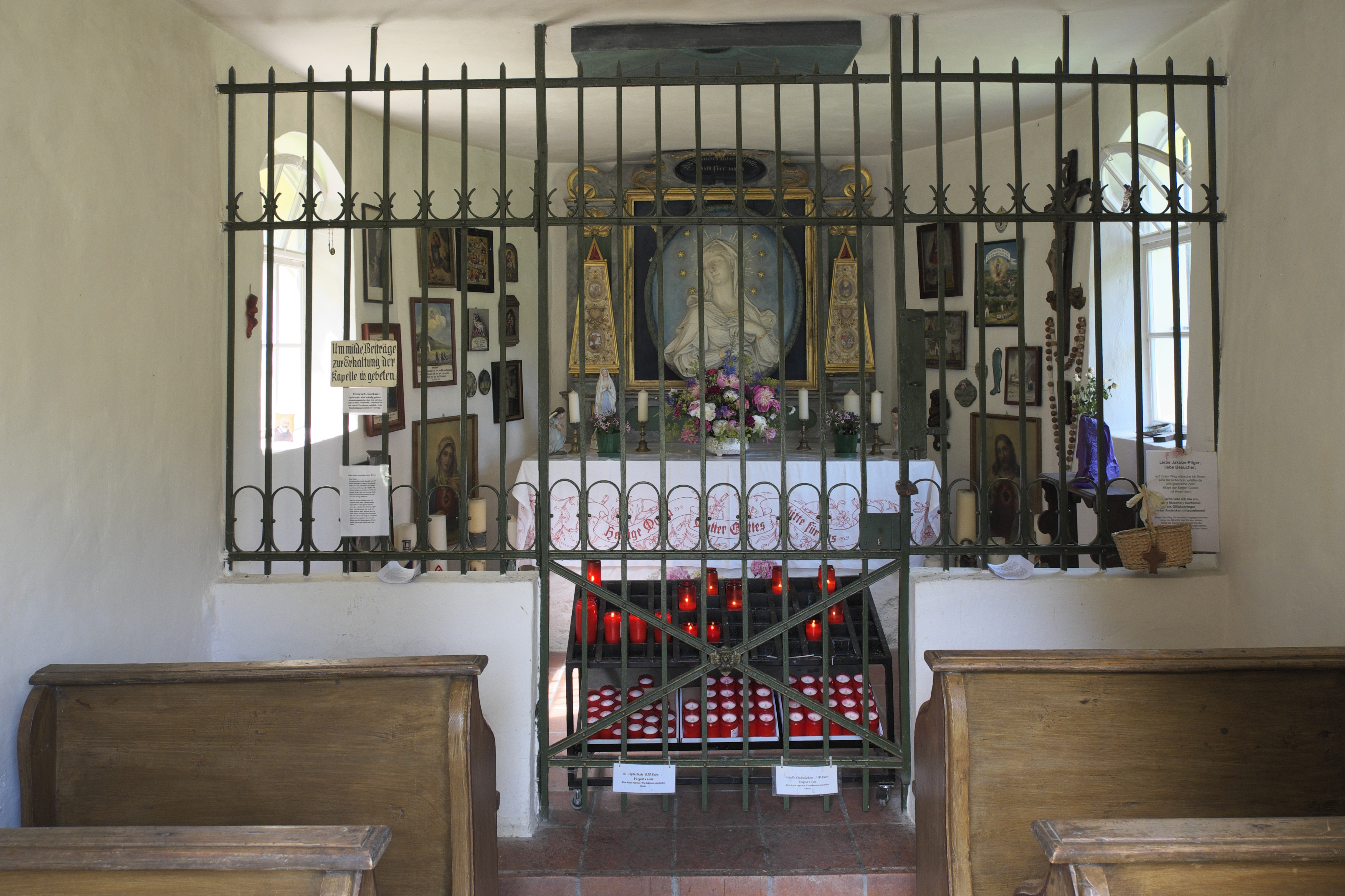 Waldkapelle in Neufahrn (Schäftlarn) im Landkreis München (Bayern, Deutschland), Innenraum